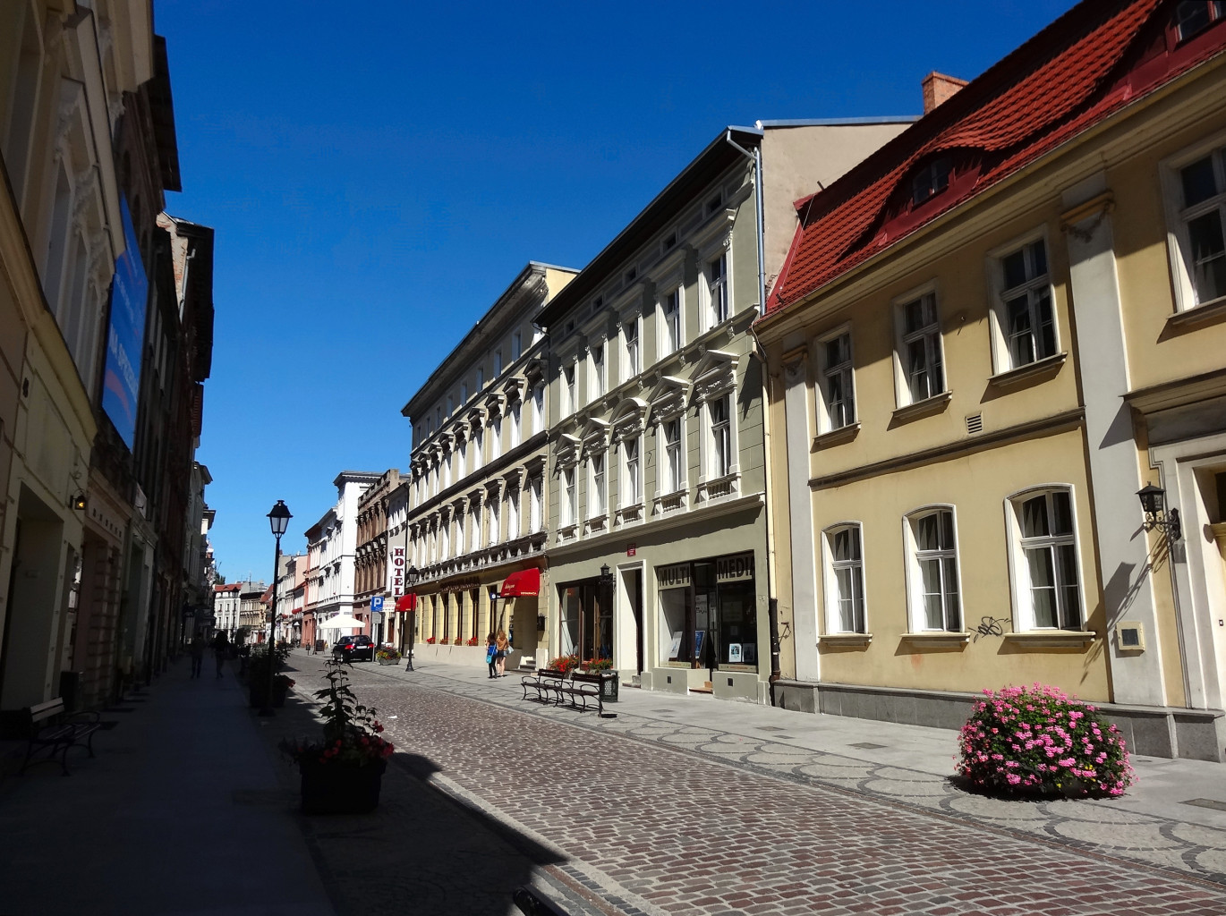 Ulica Długa na Starym Mieście w Bydgoszczy